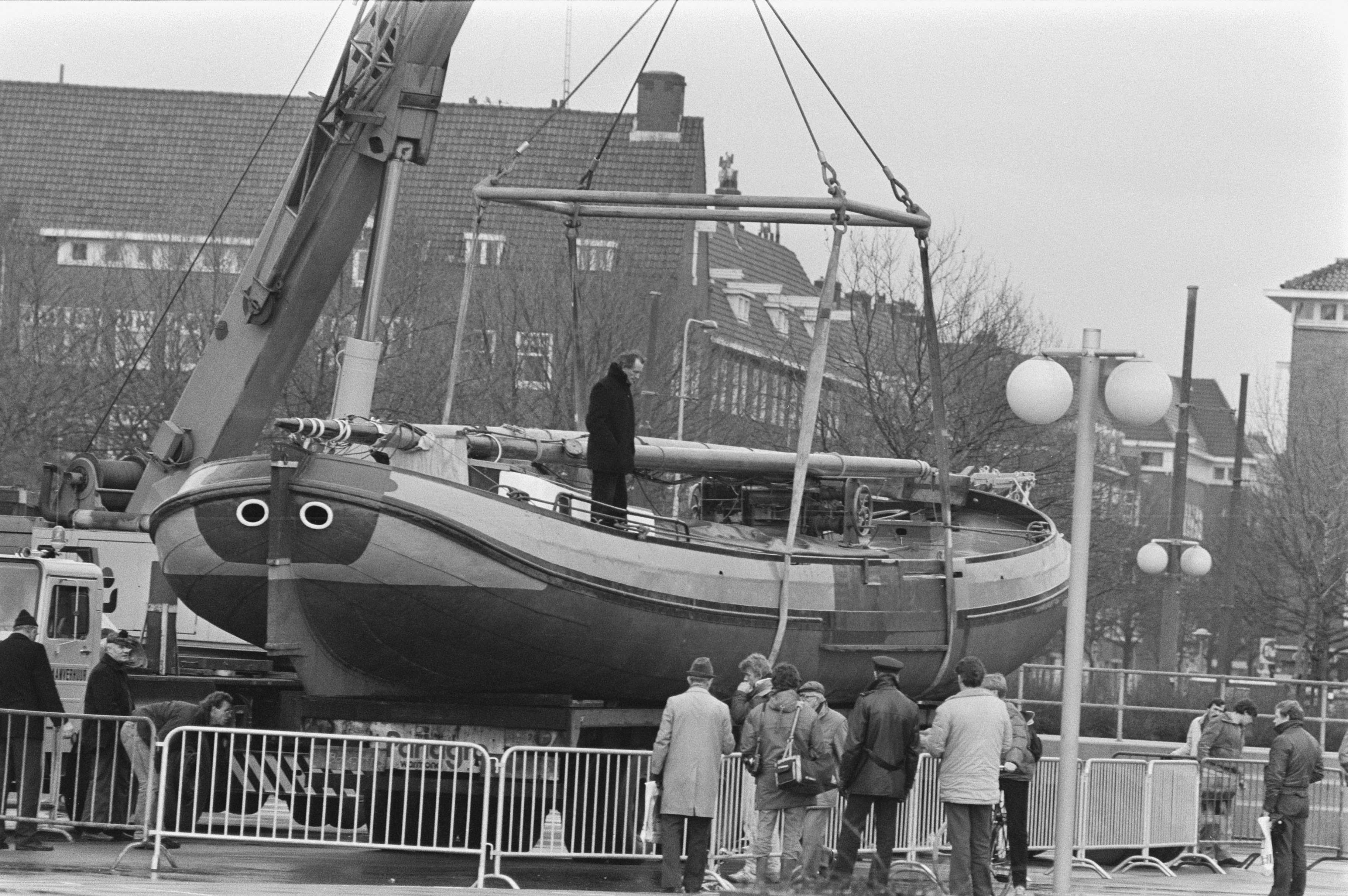 In verband met de Hiswa in de RAI heeft men voor de RAI en skutsje geplaatst (de Sneker Pan).